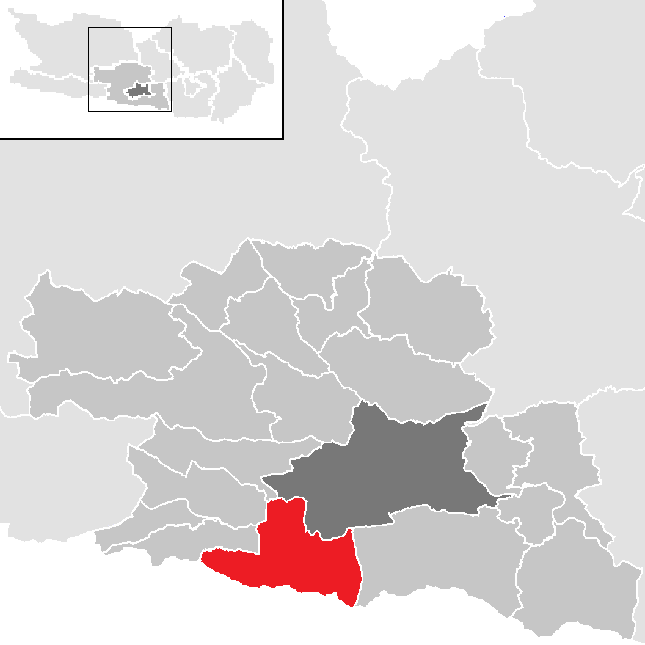 Bezirk Villach-Land